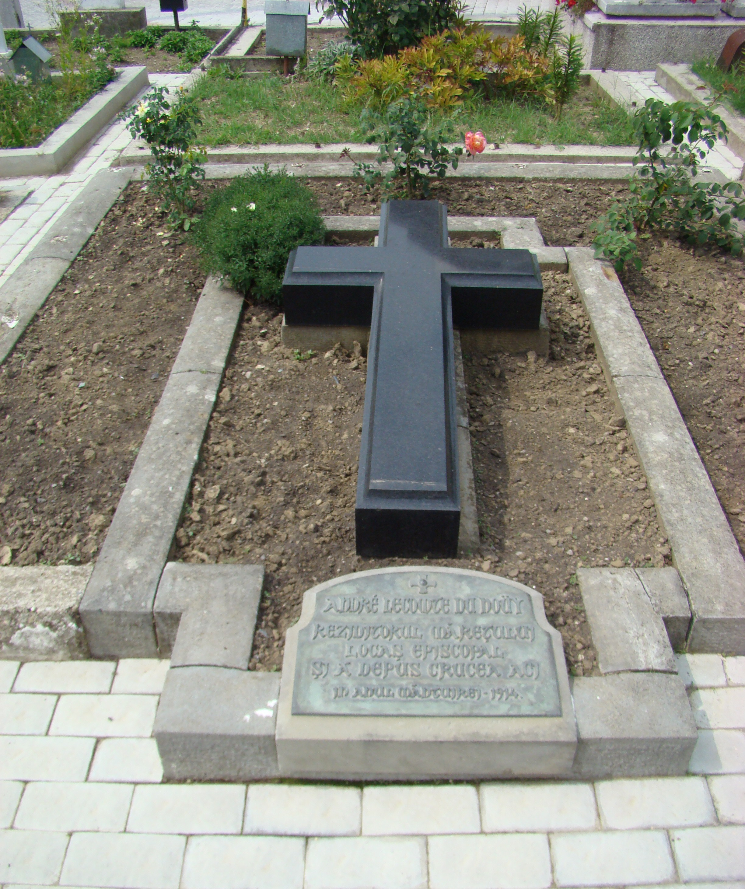 Mormântul arhitectului Emile André Lecomte du Noüy